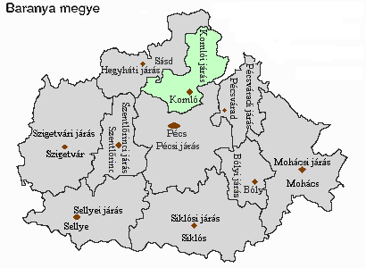 Magyarország, Baranya megye, Komlói járás